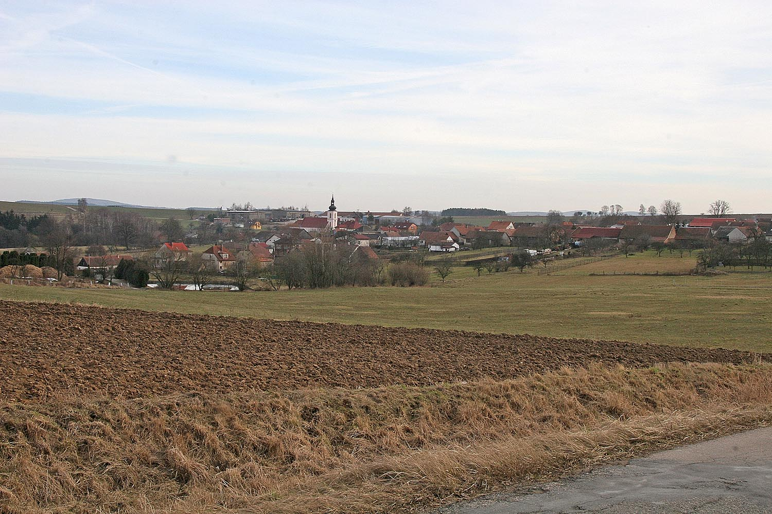 Radošovice u Vlašimi v okrese Benešov ze silnice od Bílkovic